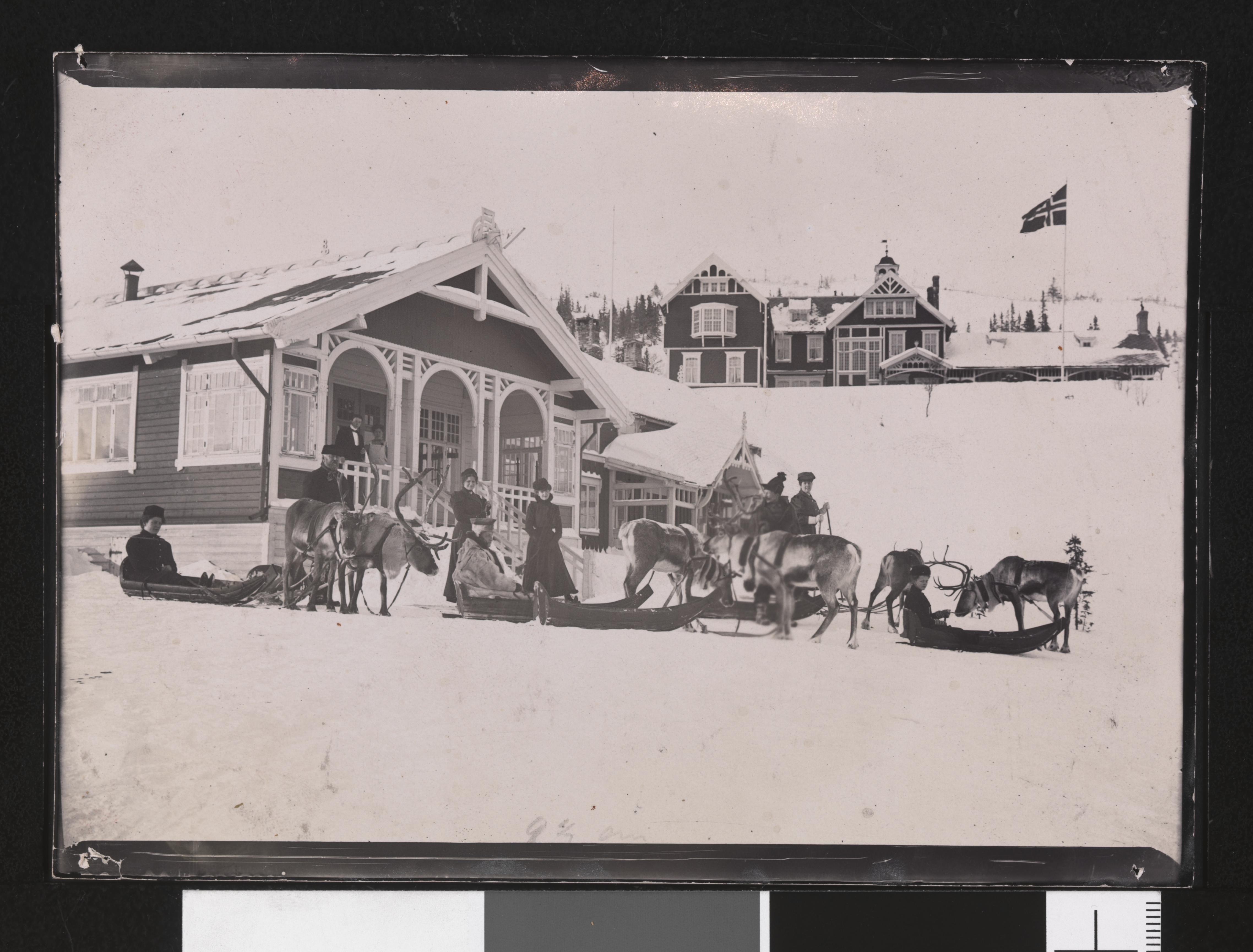 Bildet er hentet fra Nasjonalbibliotekets bildesamling. Anmerkninger til bildet var: Tittel hentet fra påskrift på komponentnr 1 Kampervollen, Trondheim, Sør Trøndelag